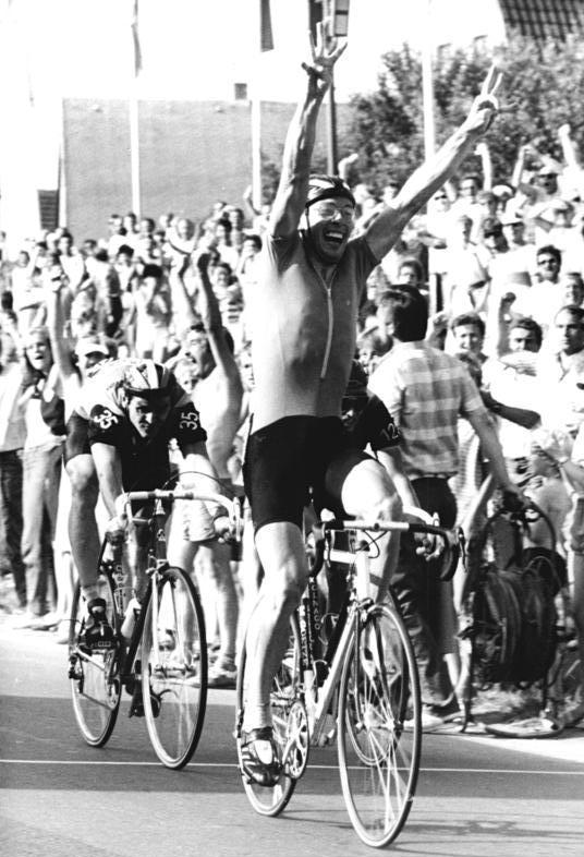 Martin Goetze, Falk Boden ADN-ZB Gahlbeck 23.7.88 Bez. Leipzig:DDR-Meisterschaften im Straßenradsport in Frohburg - Überraschungssieger bei den Männern wurde nach dem 203-Kilometer-Rennen der 30jährige Grödlinger Martin Goetze. Nach ihm kamen Falk Boden (l.) und Olaf Ludwig (r.) ins Ziel.